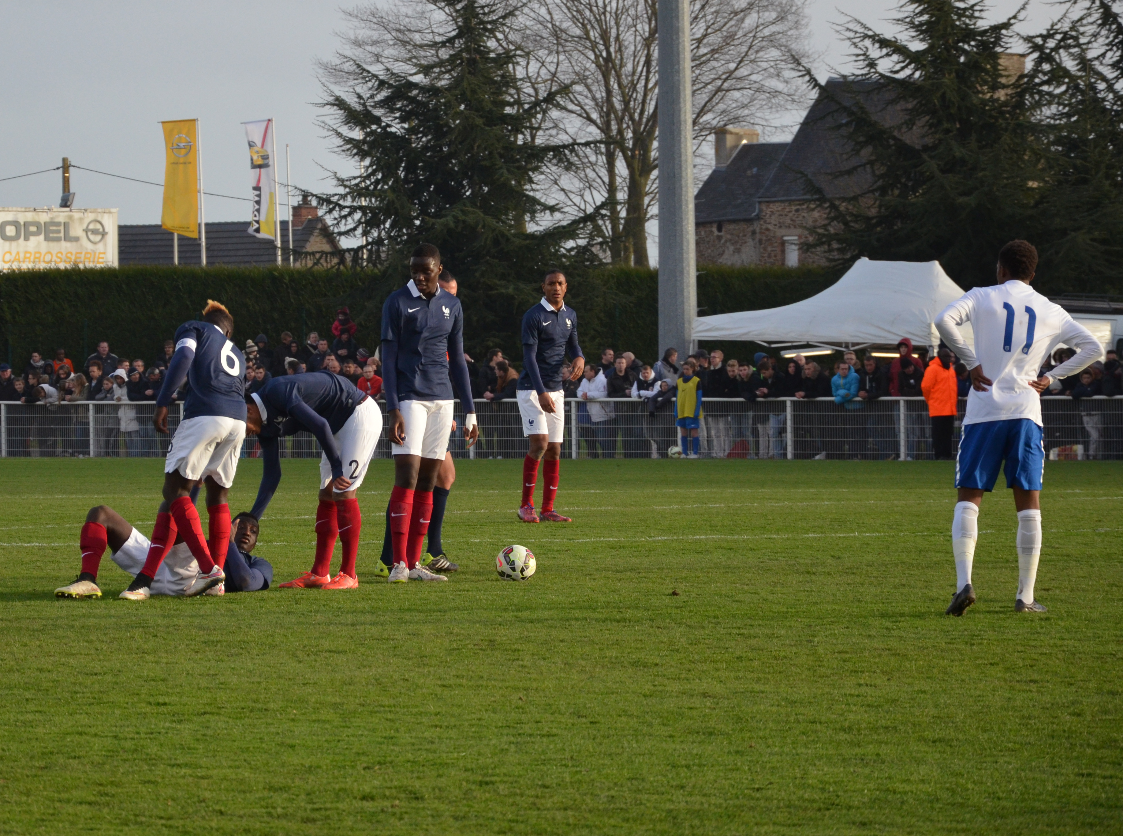 Photographie prise lors du match opposant la France à l'Angleterre pour les qualifications du championnat d'Europe de football des moins de 19 ans 2015 au stade Louis-Villemer de Saint-Lô le 31 mars 2015. Ici, joueurs français autour d'un de leurs coéquipiers, blessé.